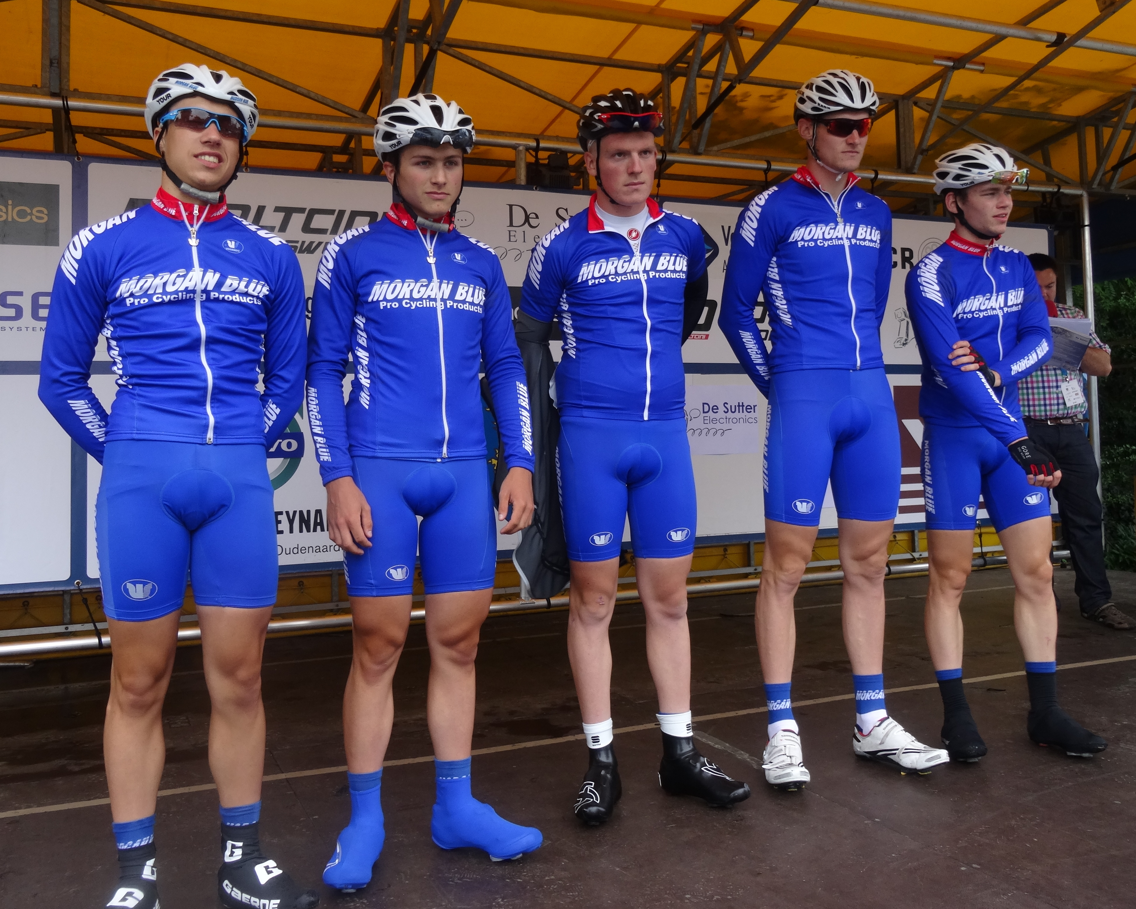 Reportage photographique réalisé le samedi 5 juillet à l'occasion du départ et de l'arrivée du Circuit Het Nieuwsblad espoirs 2014 à Grotenberge (Zottegem), Belgique.